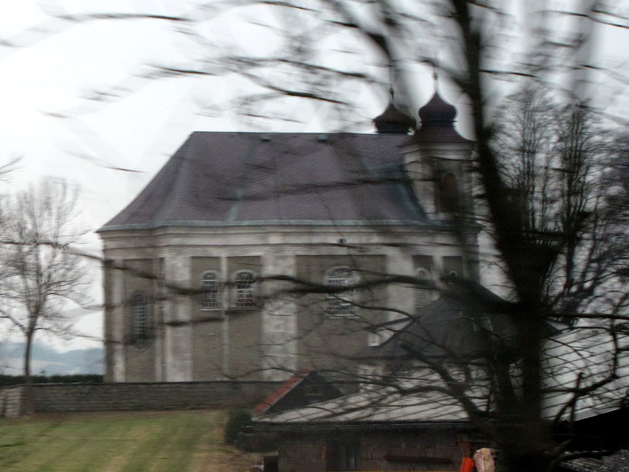 Bezděkov nad Metují, kostel sv. Prokopa